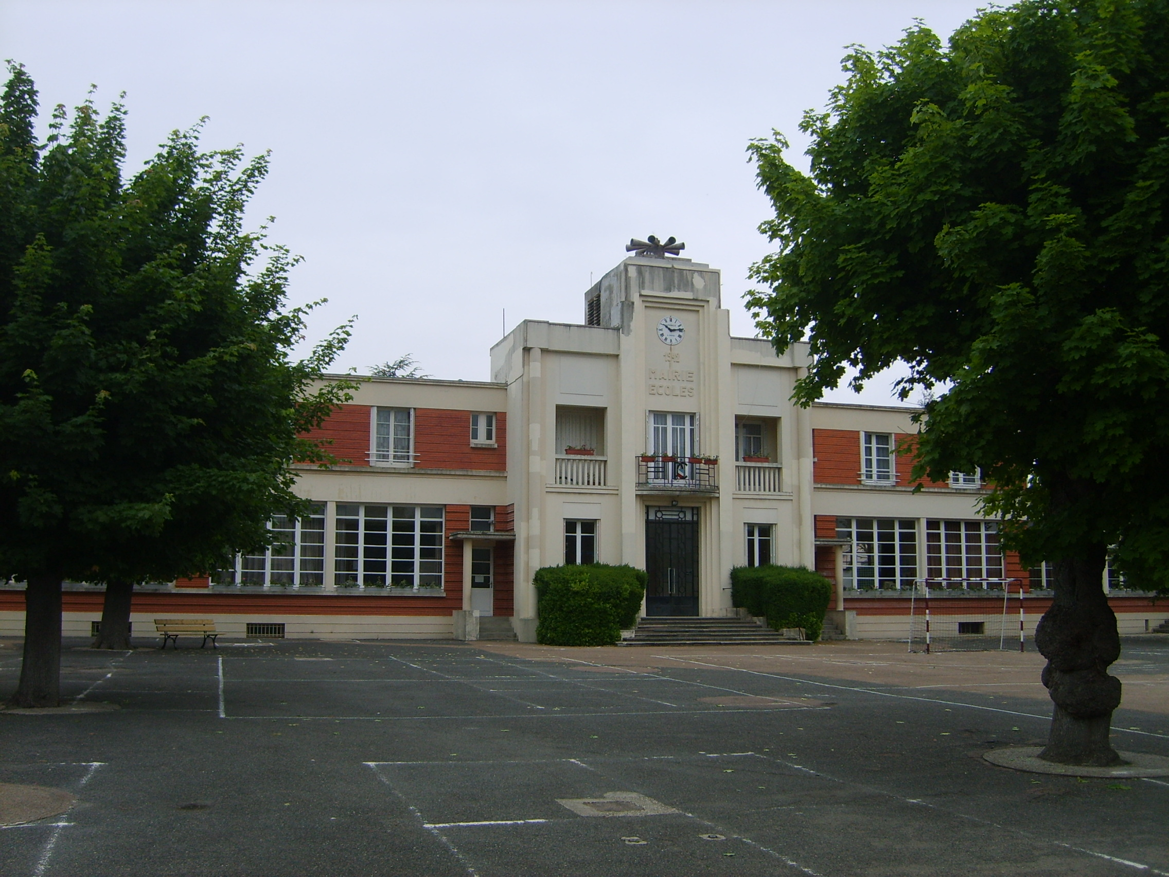 Ecole primaire de La-Rivière-de-corps dans le département de l'Aube (France)